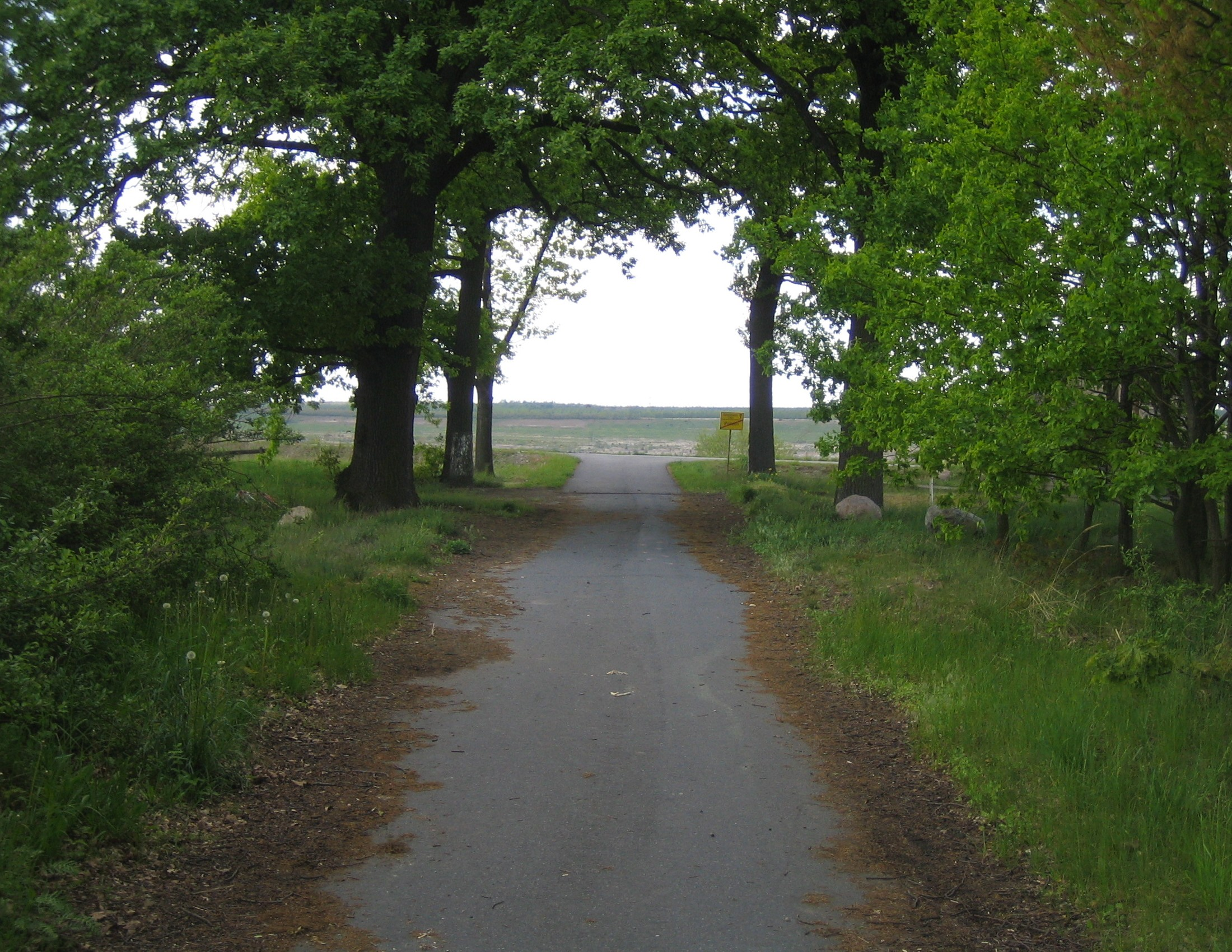 Alte Straße von Pritzen nach Altdöbern (Pritzen-Dorfstraße). Durch den ehemaligen Tagebau endet diese nun im Altdöberner See. (inoffizielles Ortsschild: Pritzen / Altdöbern 3km)